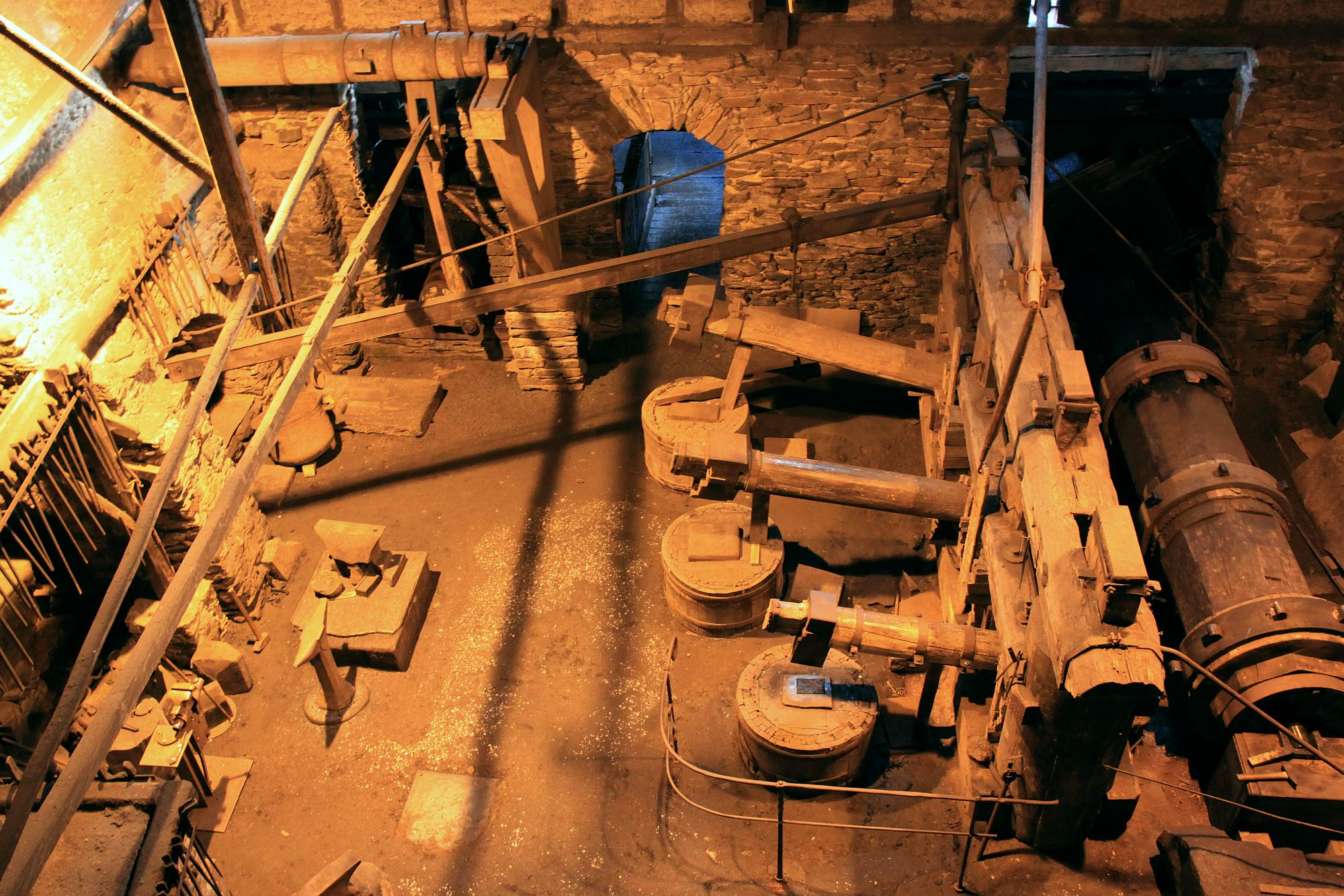 Hammerschmiede Frohnauer Hammer - Innenraum mit drei Hämmern; rechts die Antriebswelle, links die Gestänge zu zwei Blasebälgen